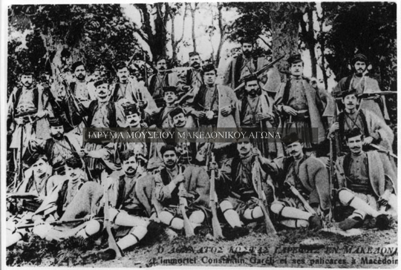 Колективна възпоменателна снимка на андартската чета на Константинос Гарефис. Димитриос Ценкос е прав на последния ред, първият от дясно.